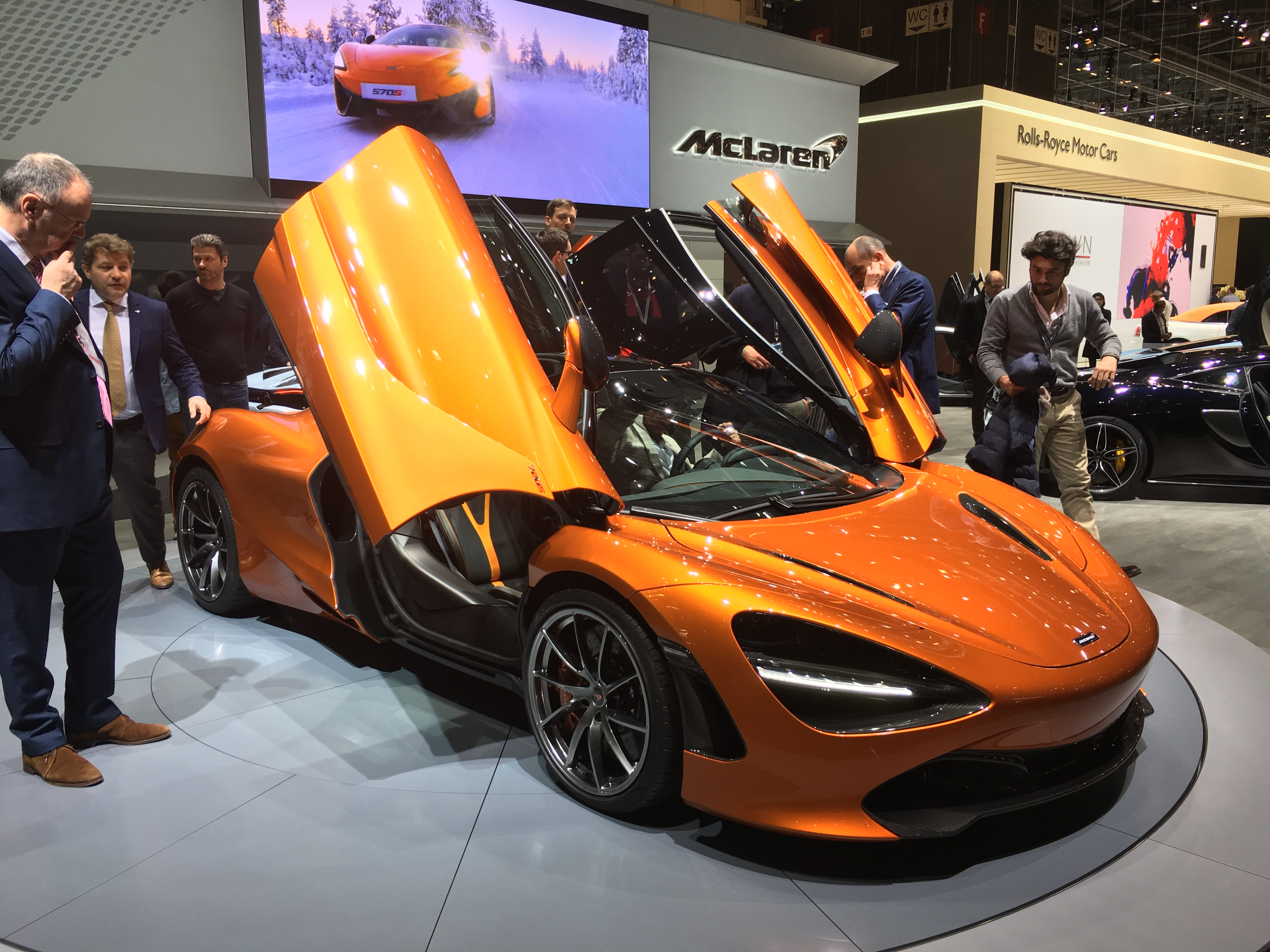 Geneva Auto Salon 2017